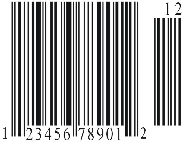 Do Vương Ngân Hà tạo ra, đưa vào sử dụng trong phạm vi công cộng.